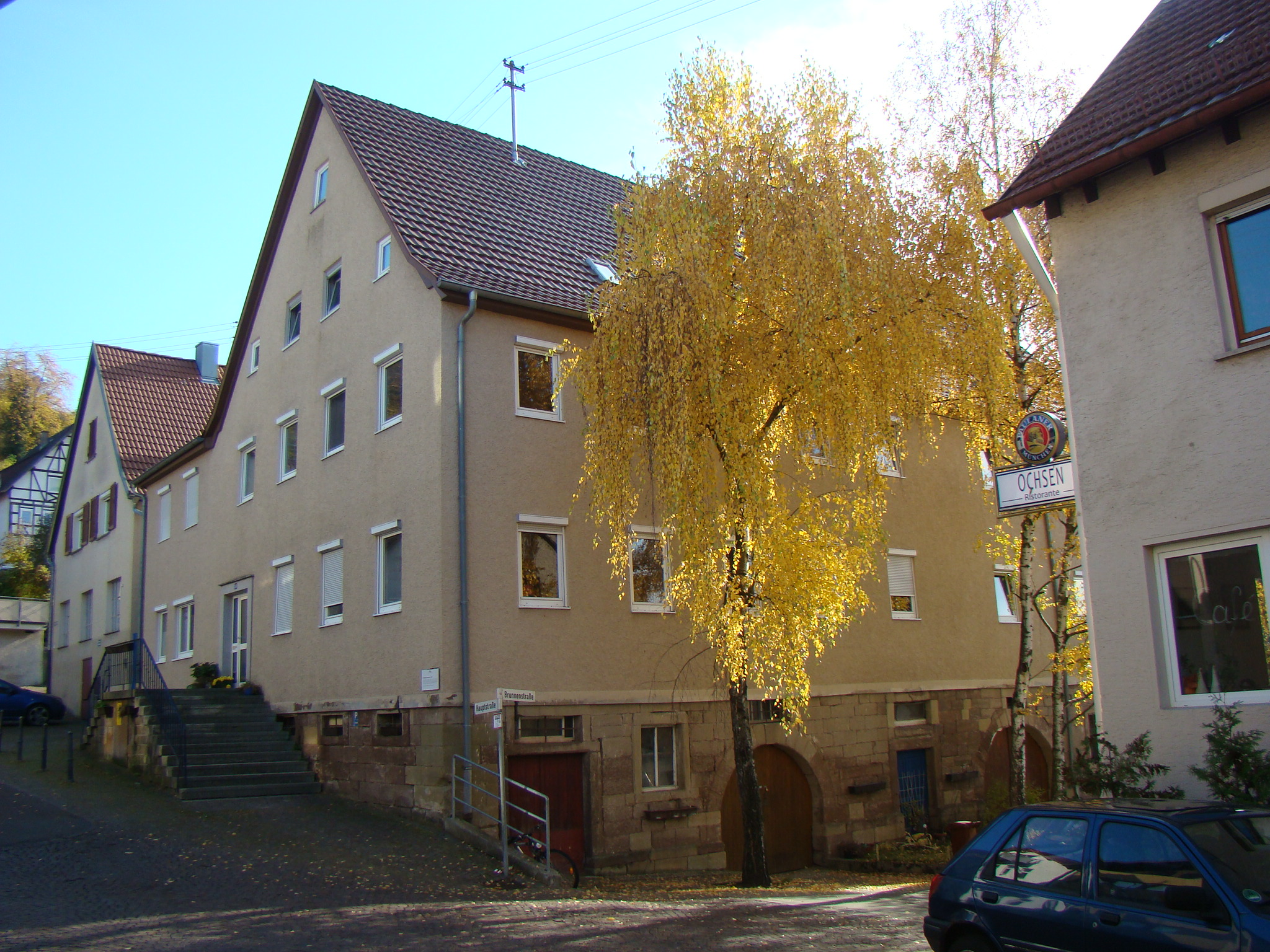 Ehemaliges Gasthaus Rose in Untergruppenbach. Foto: Peter Schmelzle (November 2011).